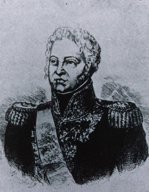 Général et Baron Français